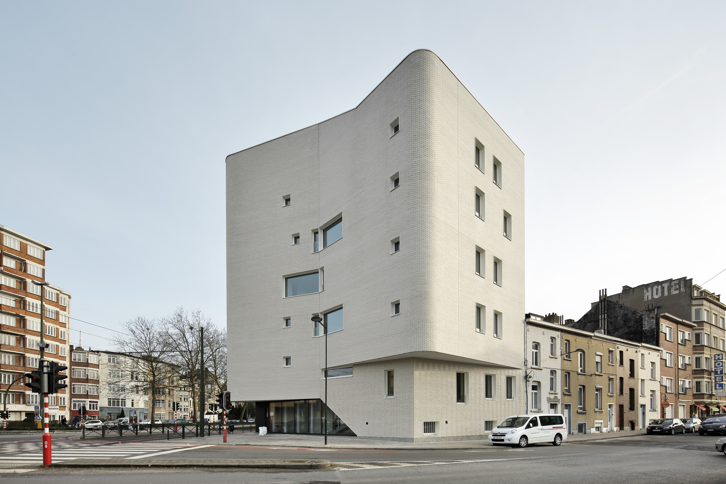 Immeuble de logements à l'angle des rues Navez et Portaels, à Schaerbeek. Réalisé dans le cadre du contrat de quartier Navez - Portaels.